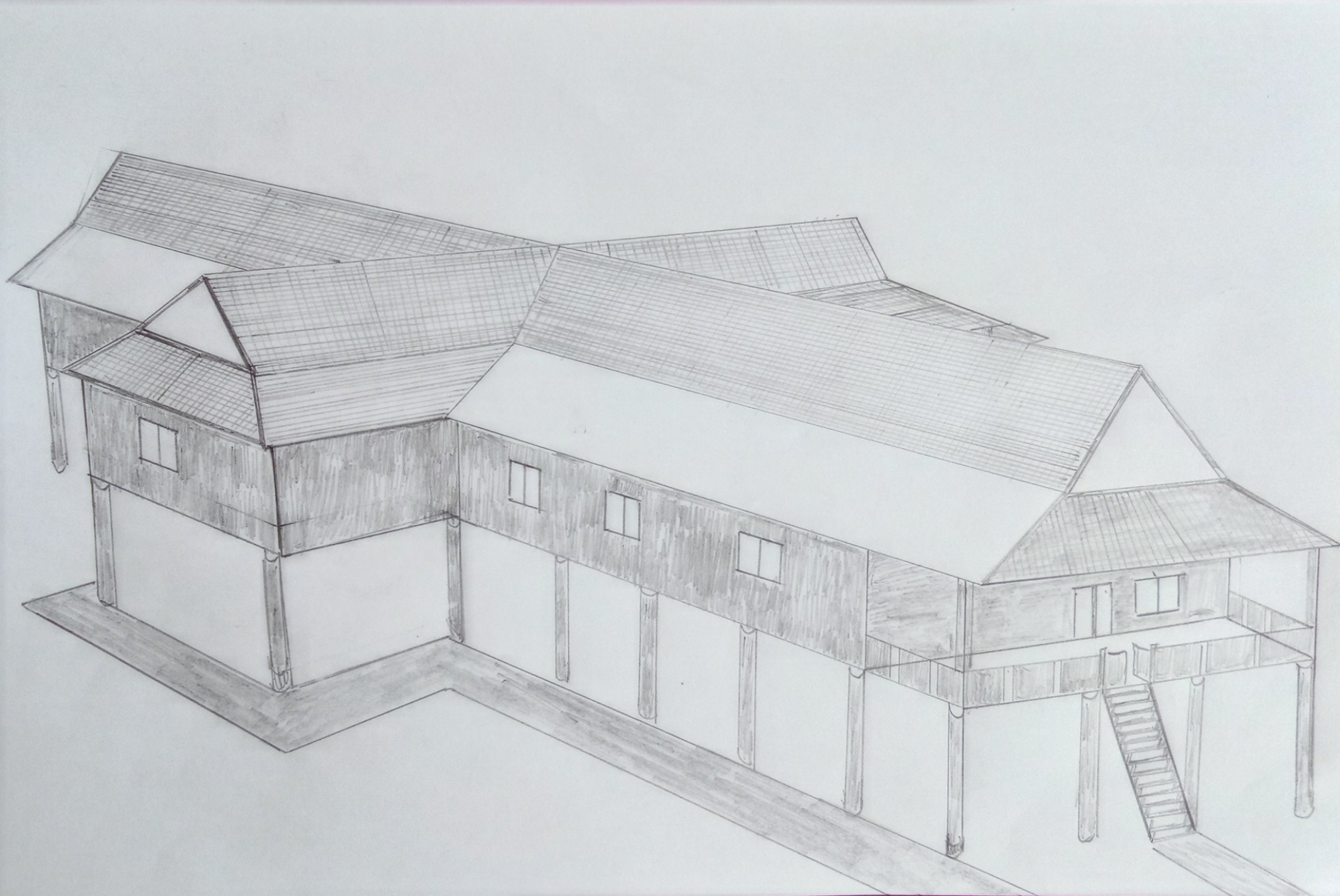 Model Huma Hai Ngabe Anom Soekah Yang Kedua